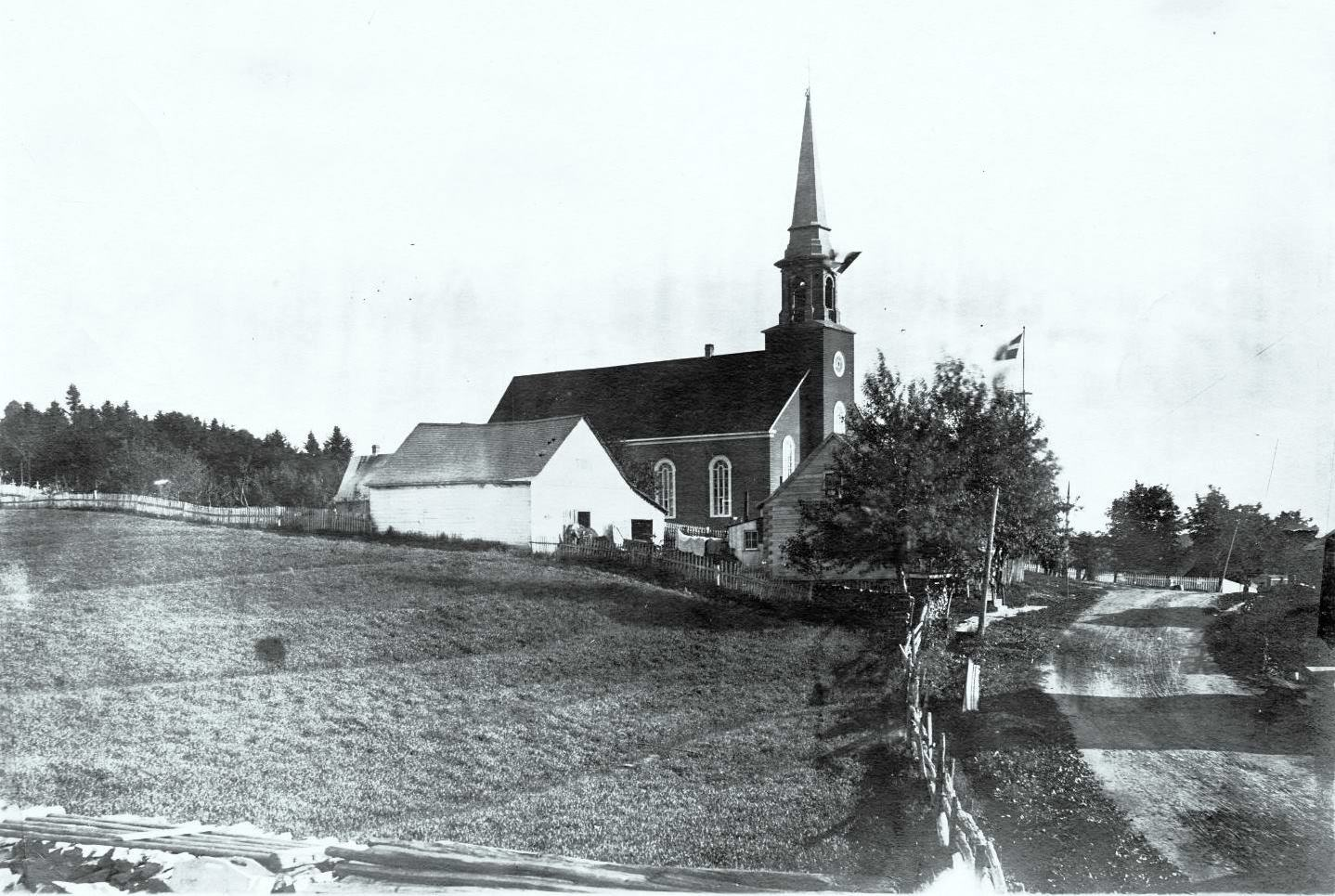 Église de Saint-Damien-de-Buckland, Québec